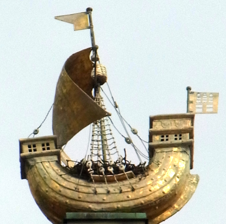 Die goldene Kogge bekrönt das Hulbe-Haus. Es enthielt außerdem wichtige Papiere, die anlässlich einer Renovierung infolge eines Sturmschadens gefunden wurde. Sie befinden sich jetzt im Museum für Kunst und Gewerbe in Hamburg